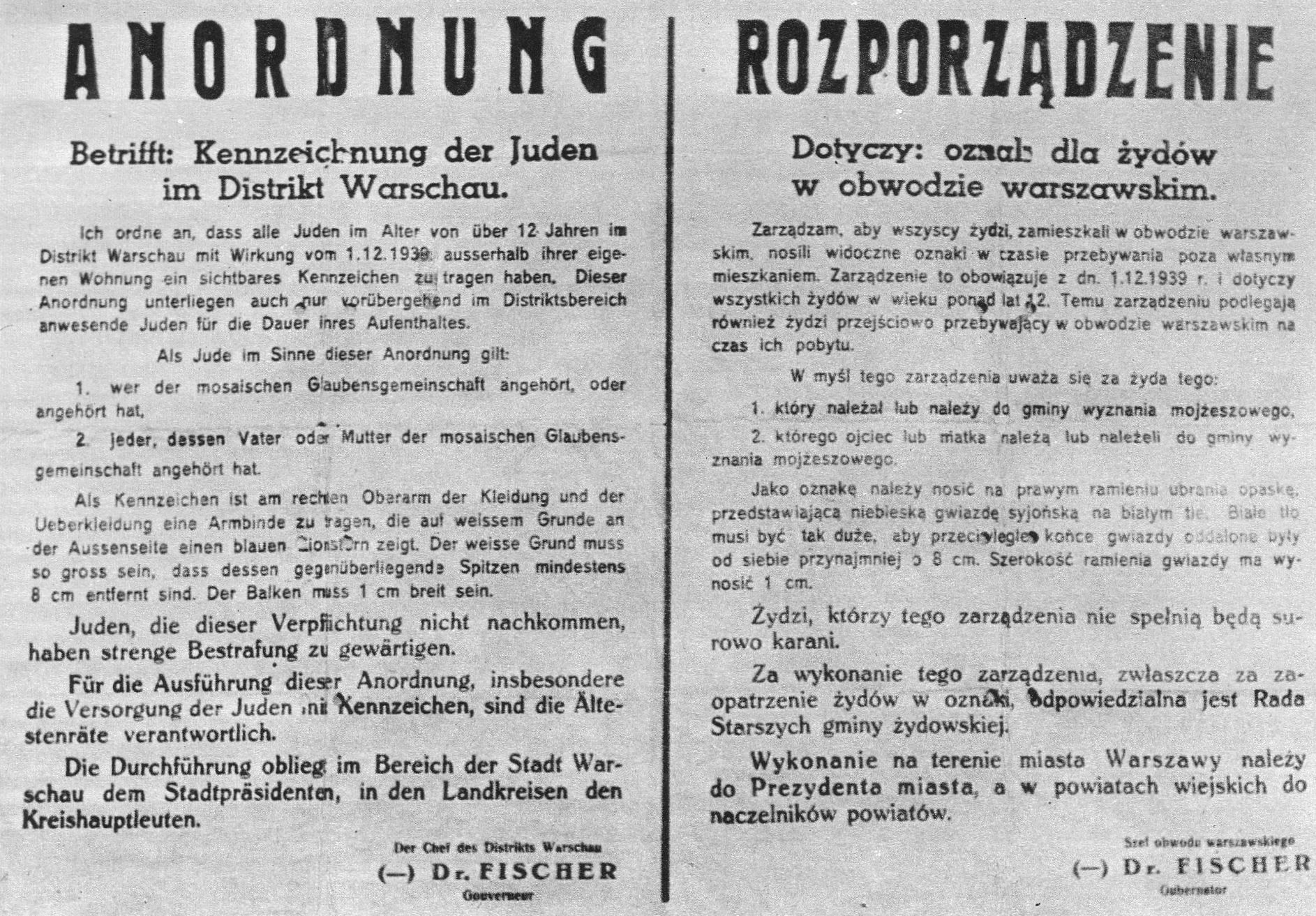 Zarządzanie gubernatora dystryktu warszawskiego o wprowadzeniu znakowania Żydów